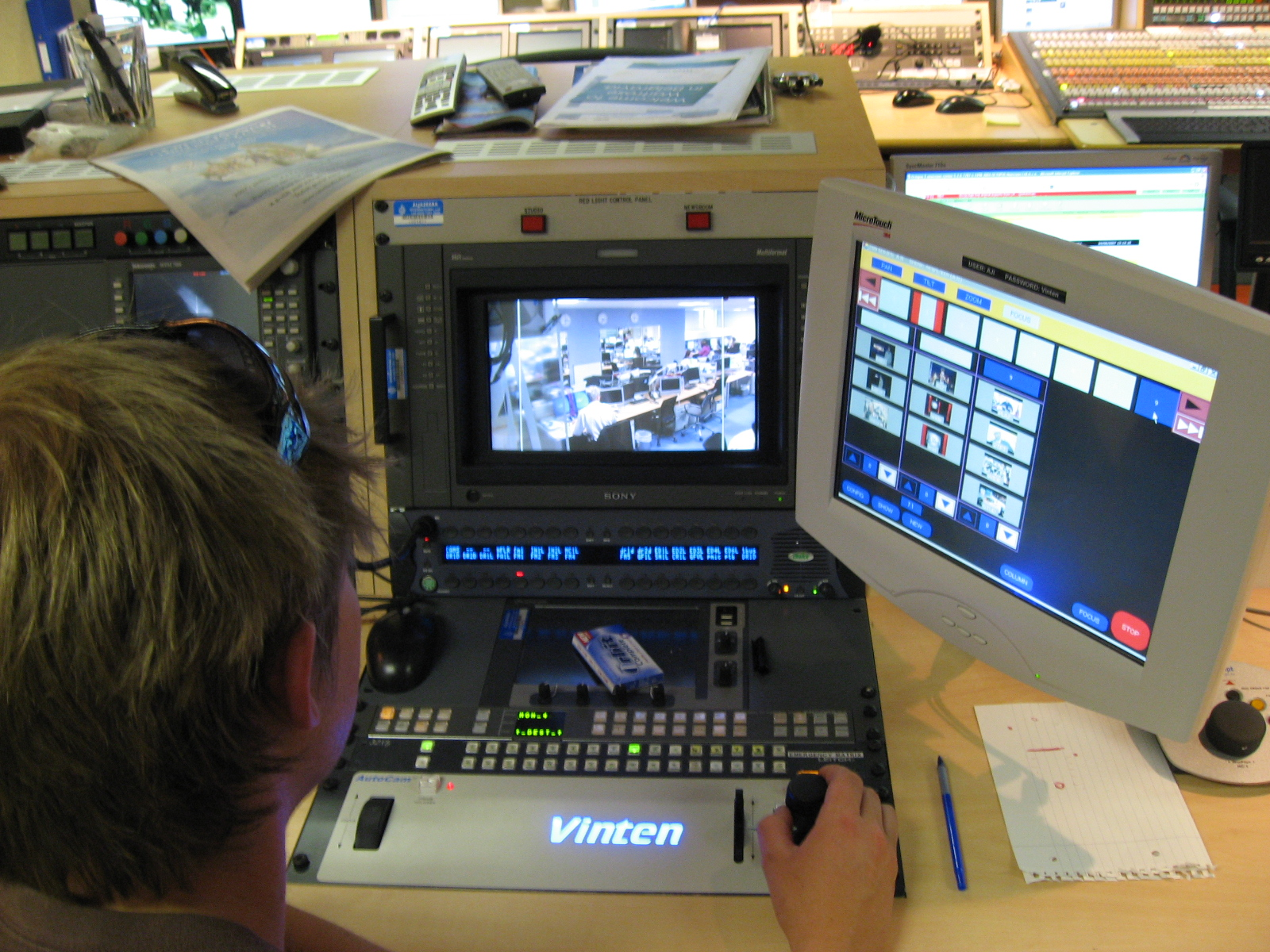 Camera control at Al Jazeera studios in London.